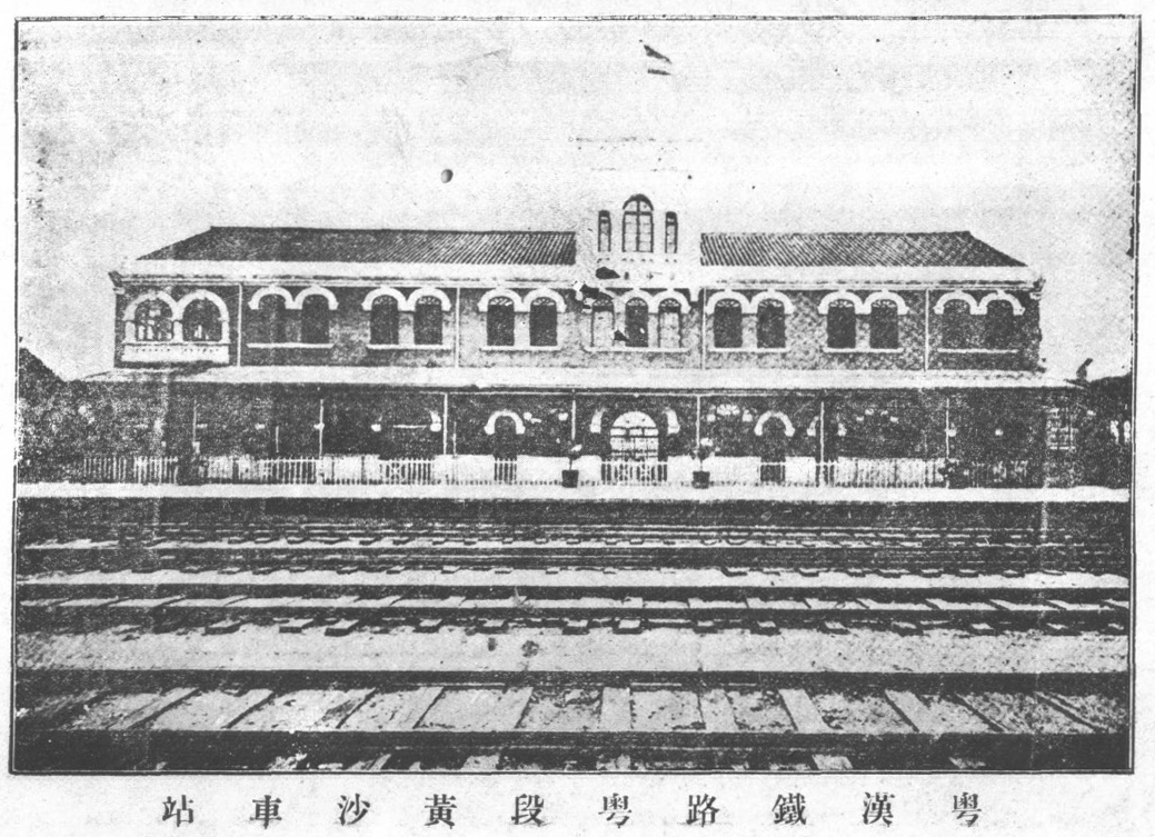 鐵路協會會刊-英國退還庚款築路問題（民國十五年六月）